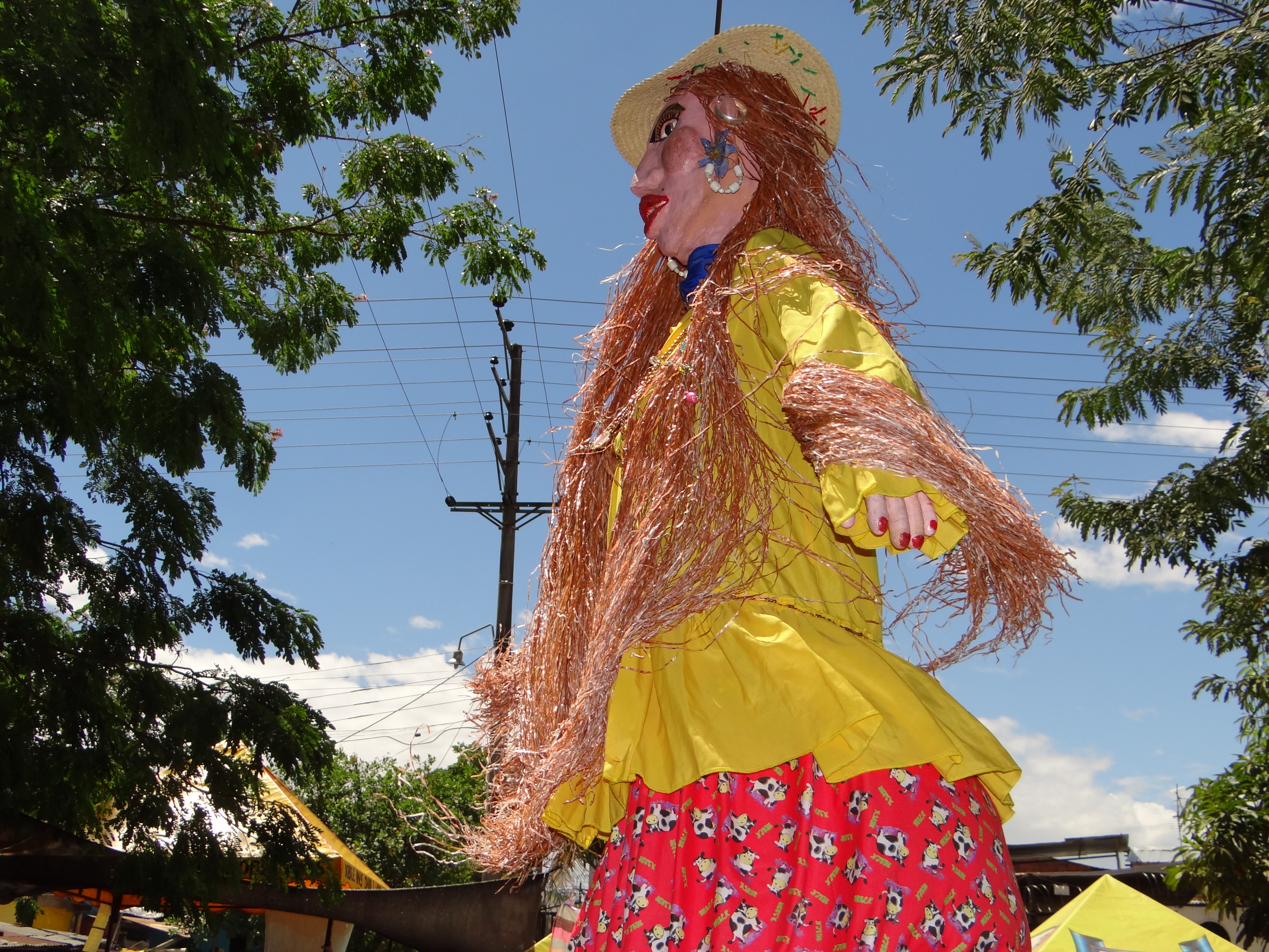 Fiestas de San Pedro en Neiva